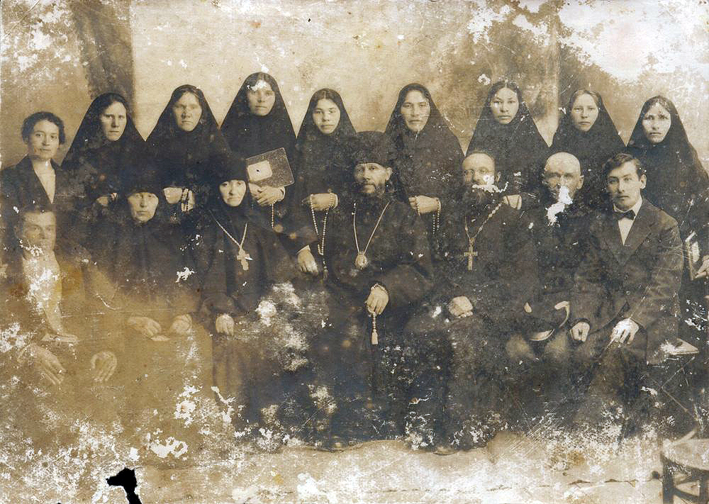 Епископ Филипп (Перов) с протоиереем Иоанном Наровчатским и монахинями Саранского Петропавловского монастыря. 1928 г.